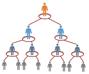 3 דרגות השפעה